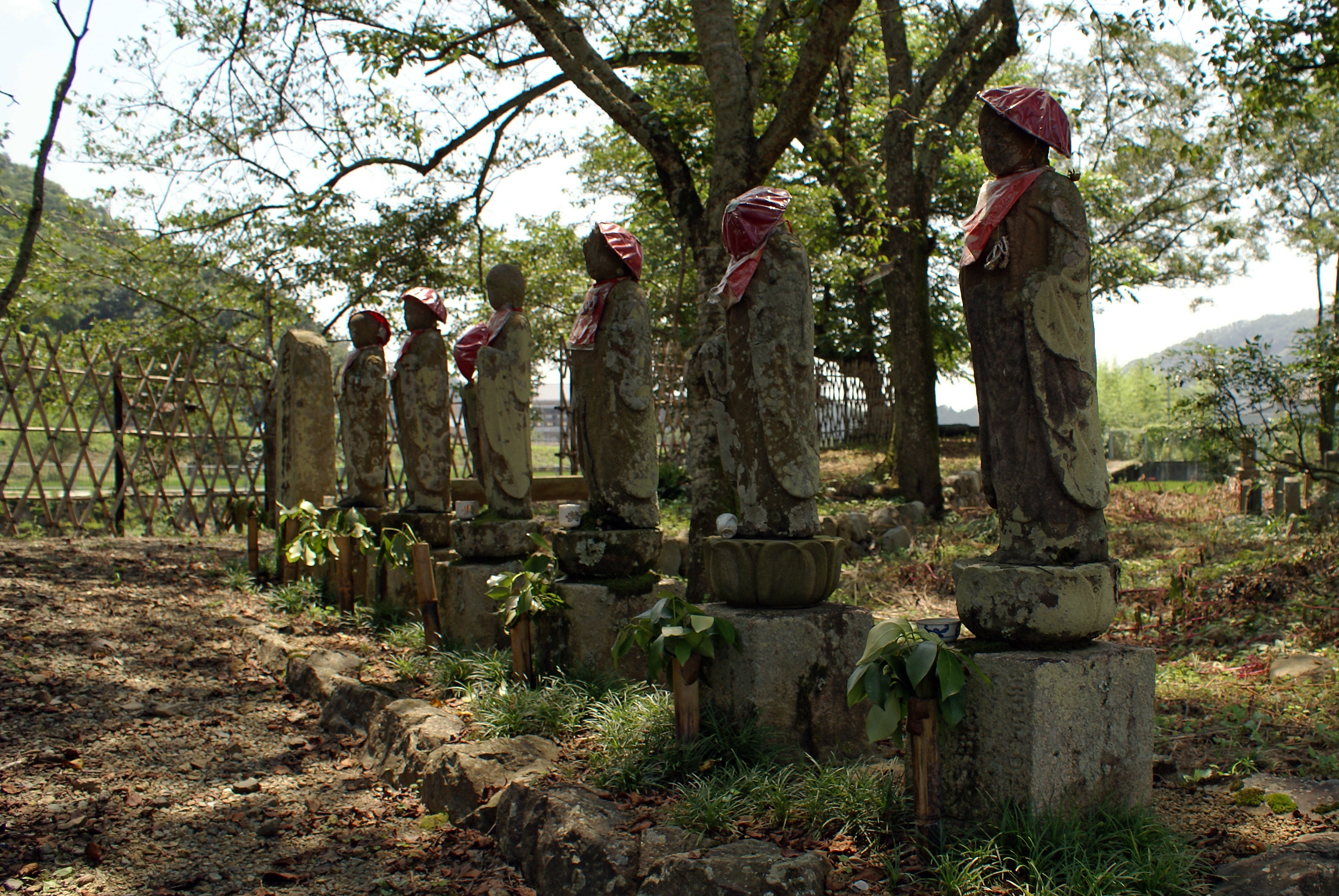 Kanakura-no-Rokujizo in Hirafuku, Sayo, Hyogo, Japan